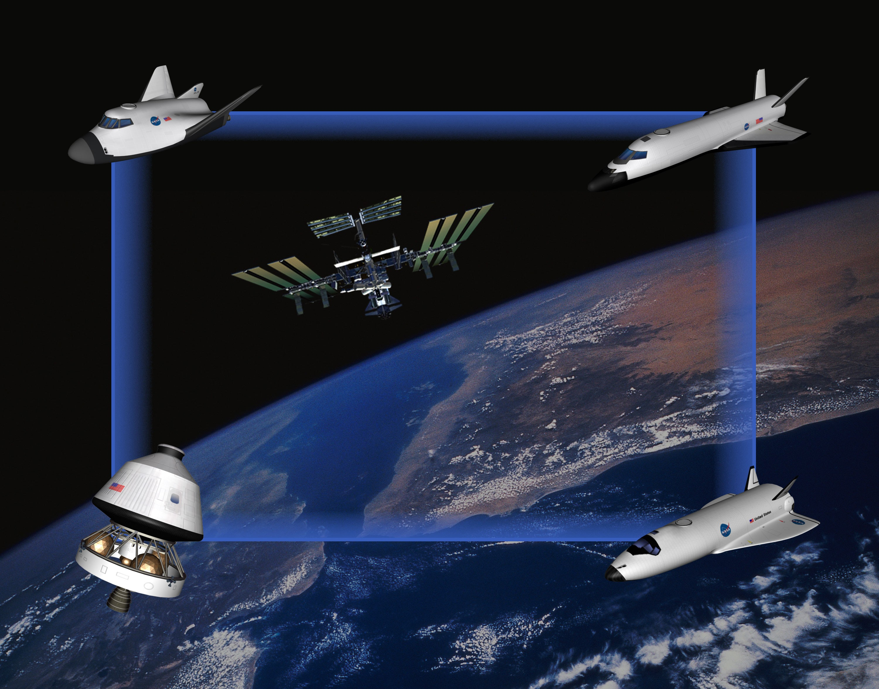 Orbital Space Plane concepts